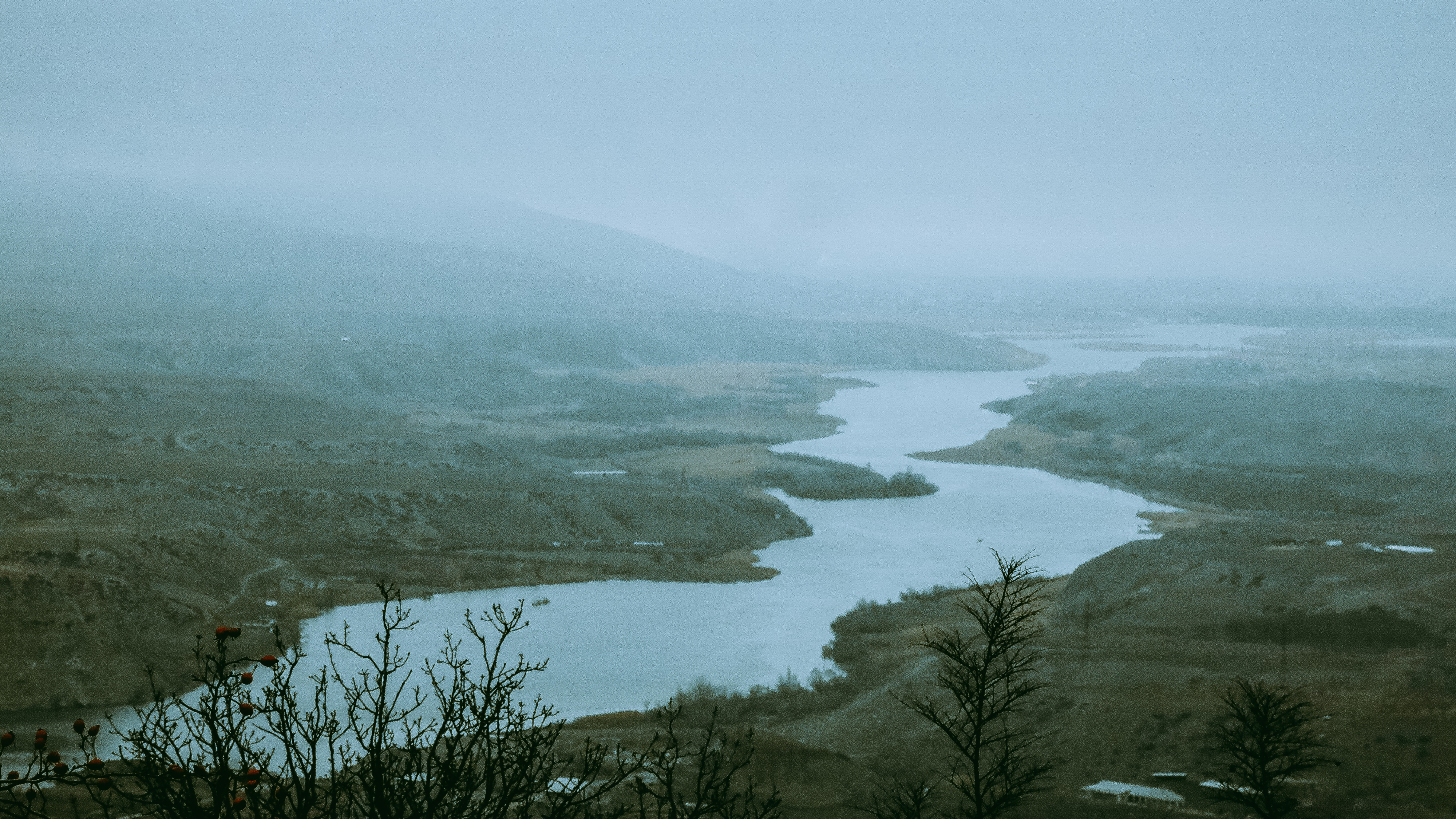 река Сулак